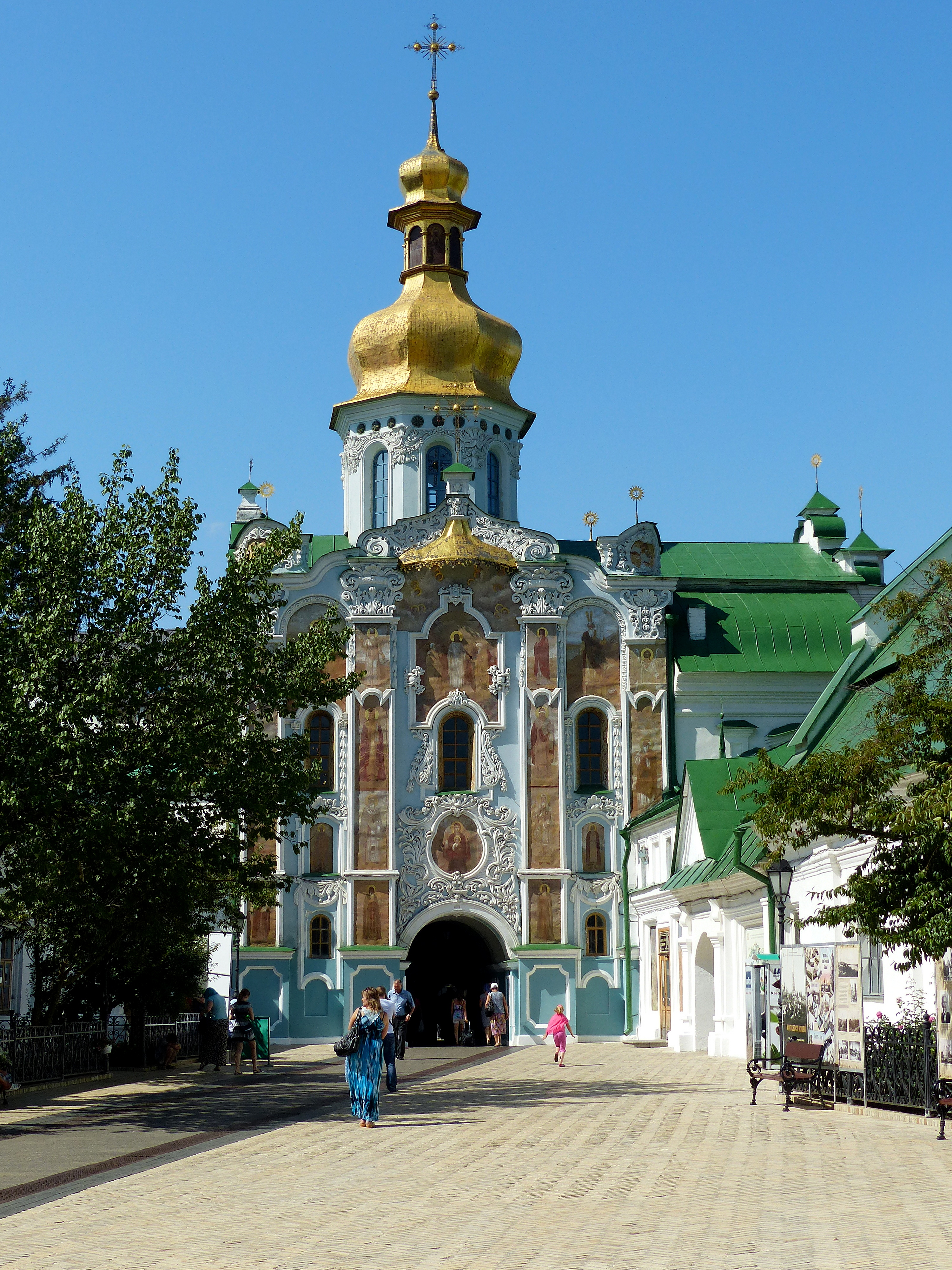 Церква Троїцька надбрамна, Київ, Лаврська вул., 9